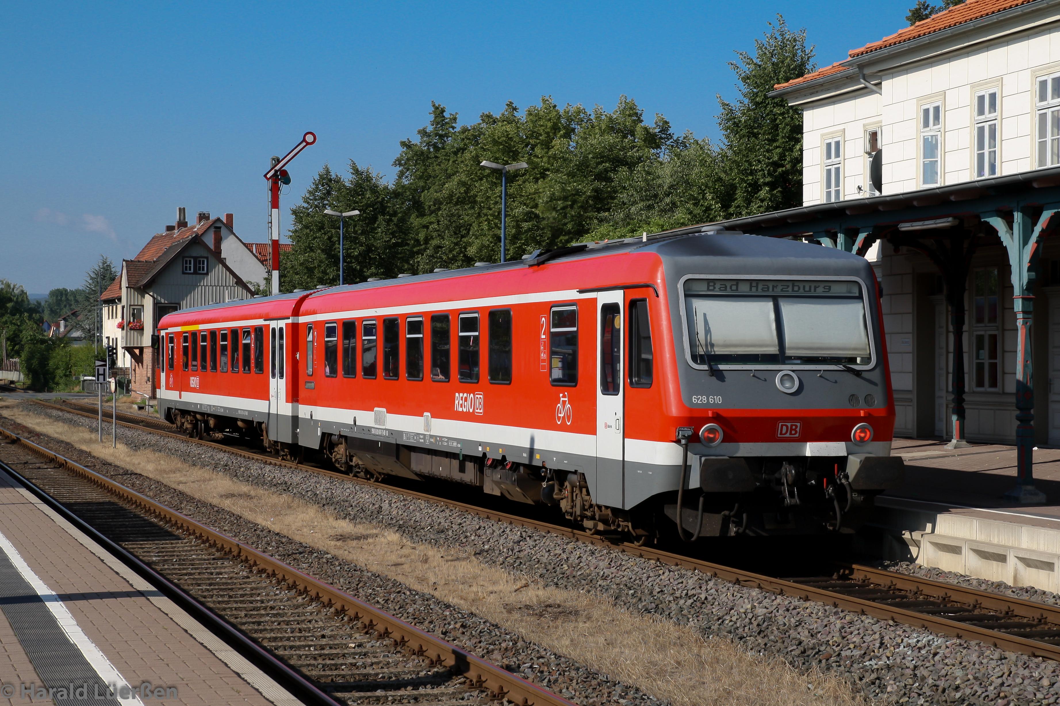 628 610 auf dem Weg von Braunschweig nach Bad Harzburg im Bahnhof Schladen